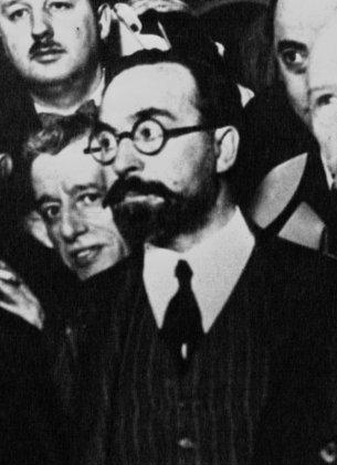 Gobierno republicano